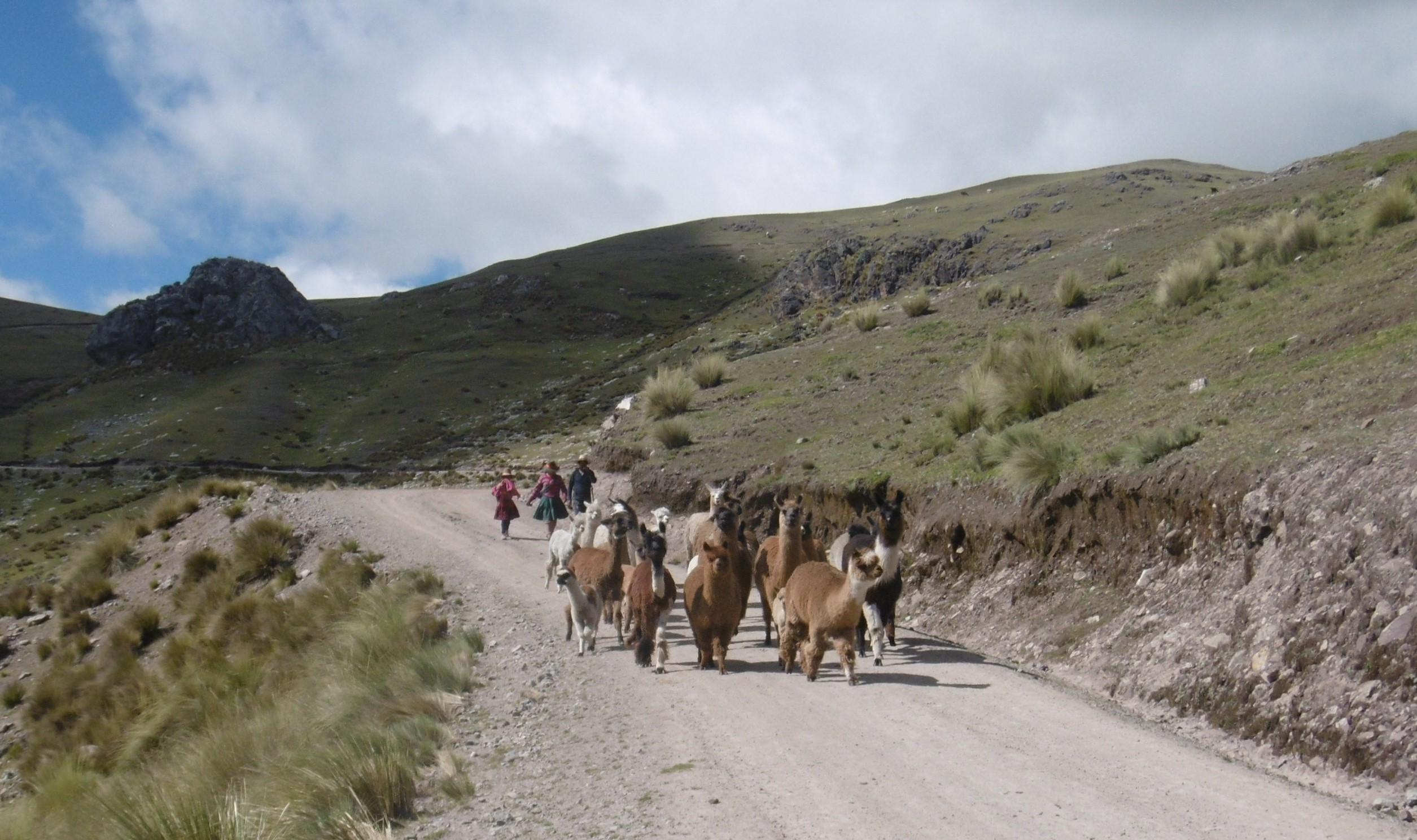 Llamas saliendo de Antayaje por la carretera.